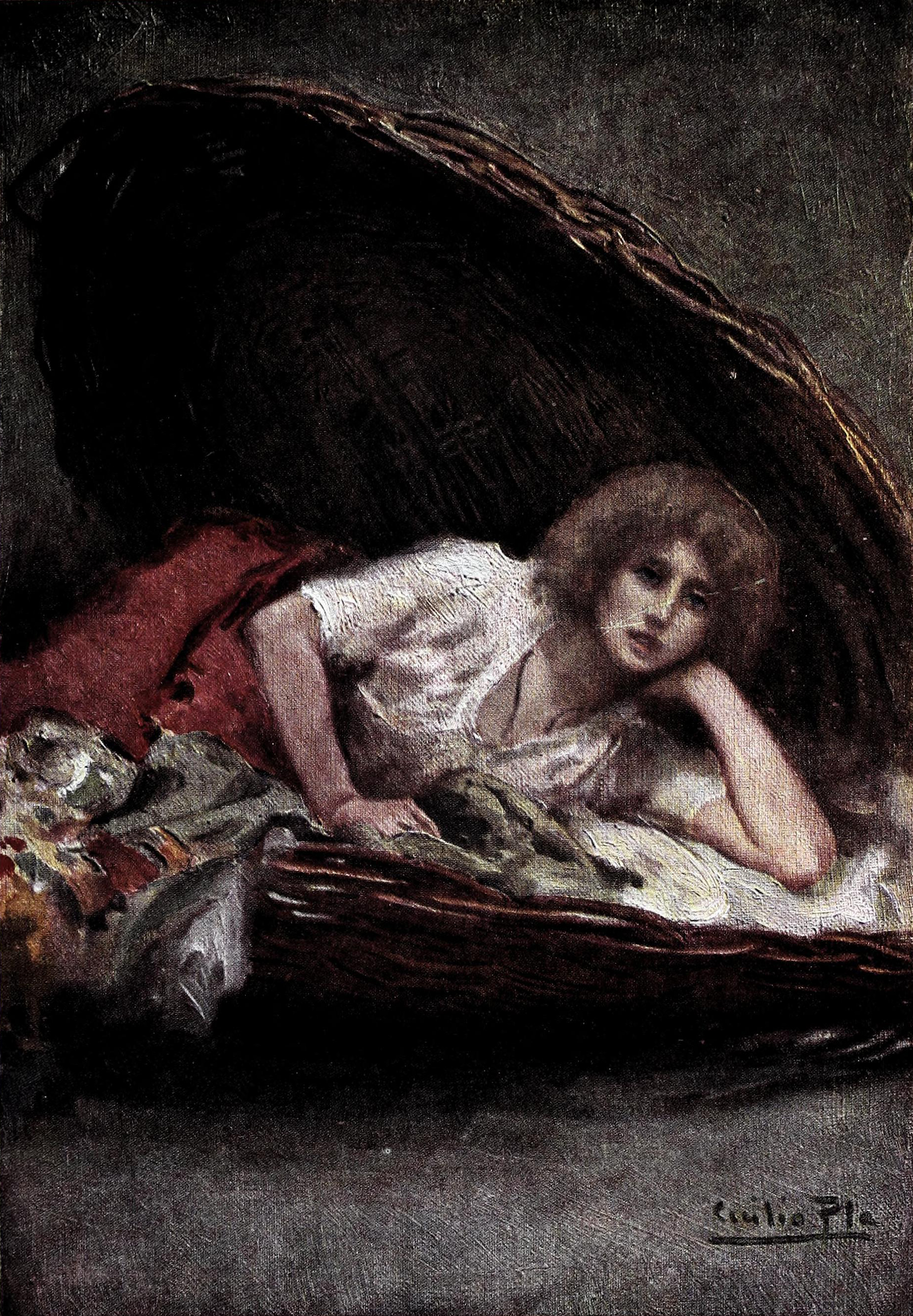 Creaciones femeninas XIII. Marianela.